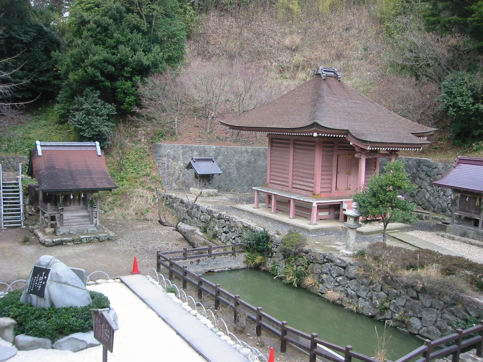 日御碕神社 境内